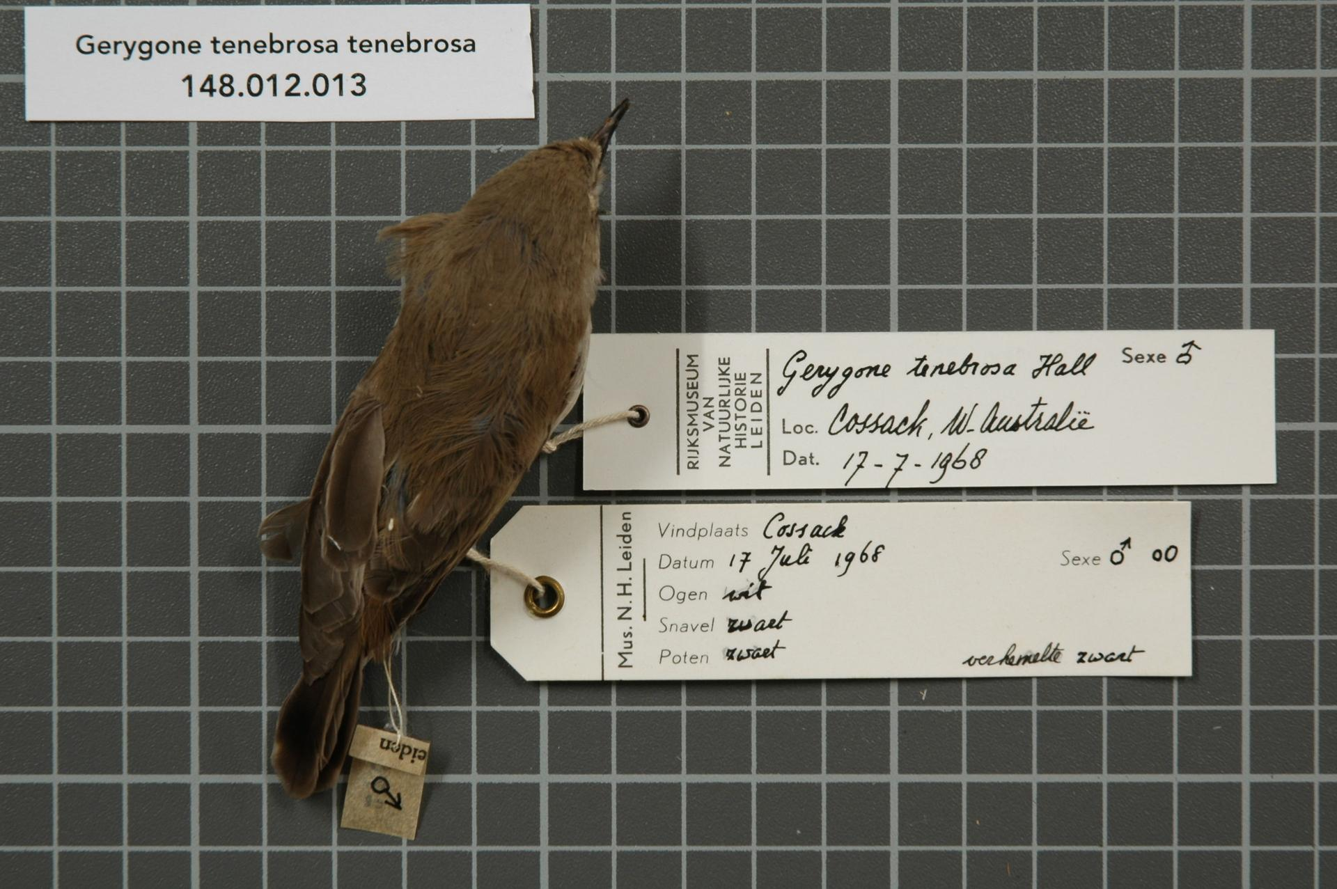 Gerygone tenebrosa tenebrosa (Hall, 1901)